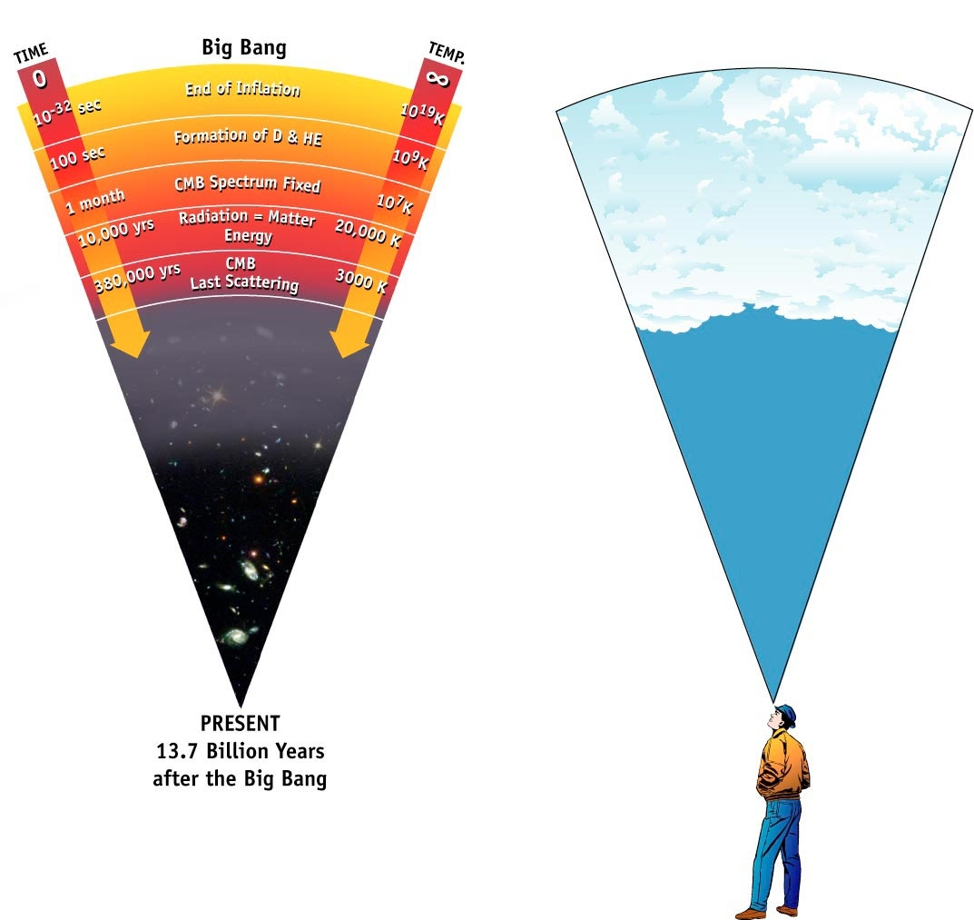 Ostatnia powierzchnia rozproszenia